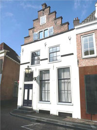 Gevel van de Witte Klavervier, Koestraat 33, Zwolle